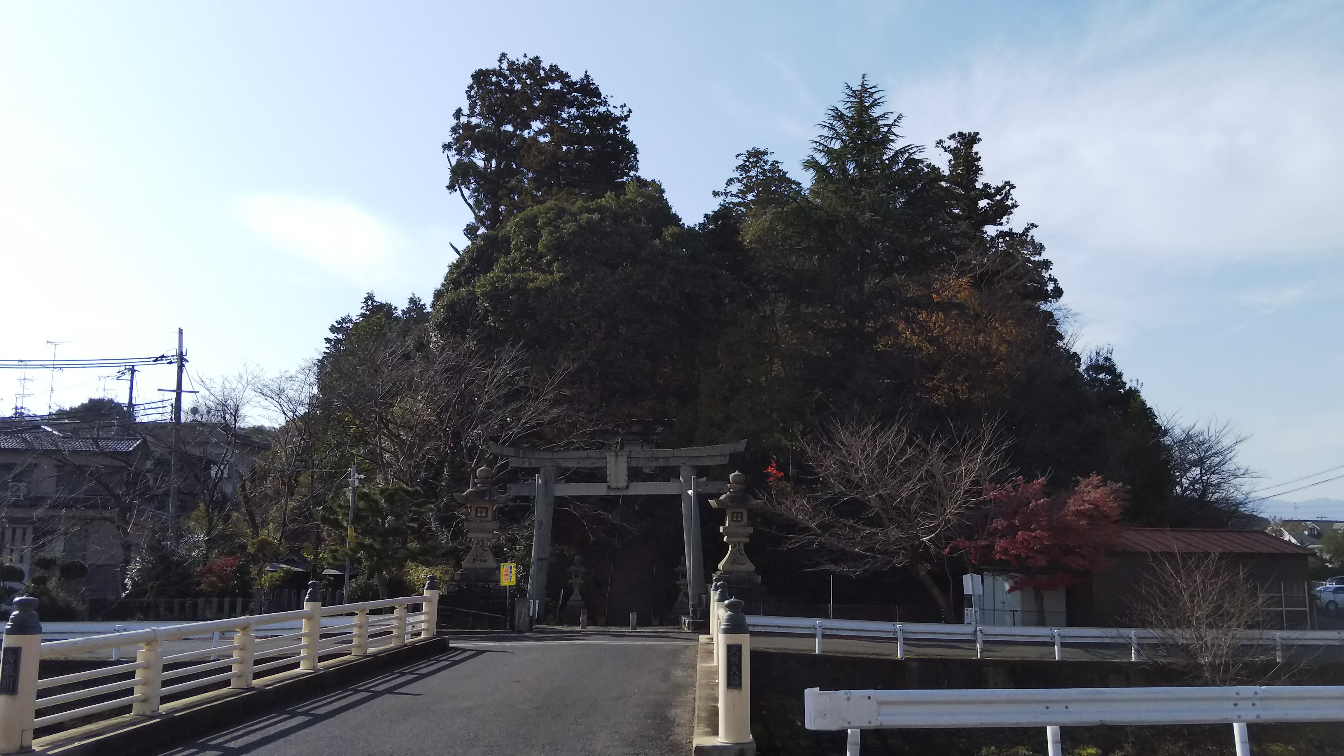 牟佐坐神社社叢